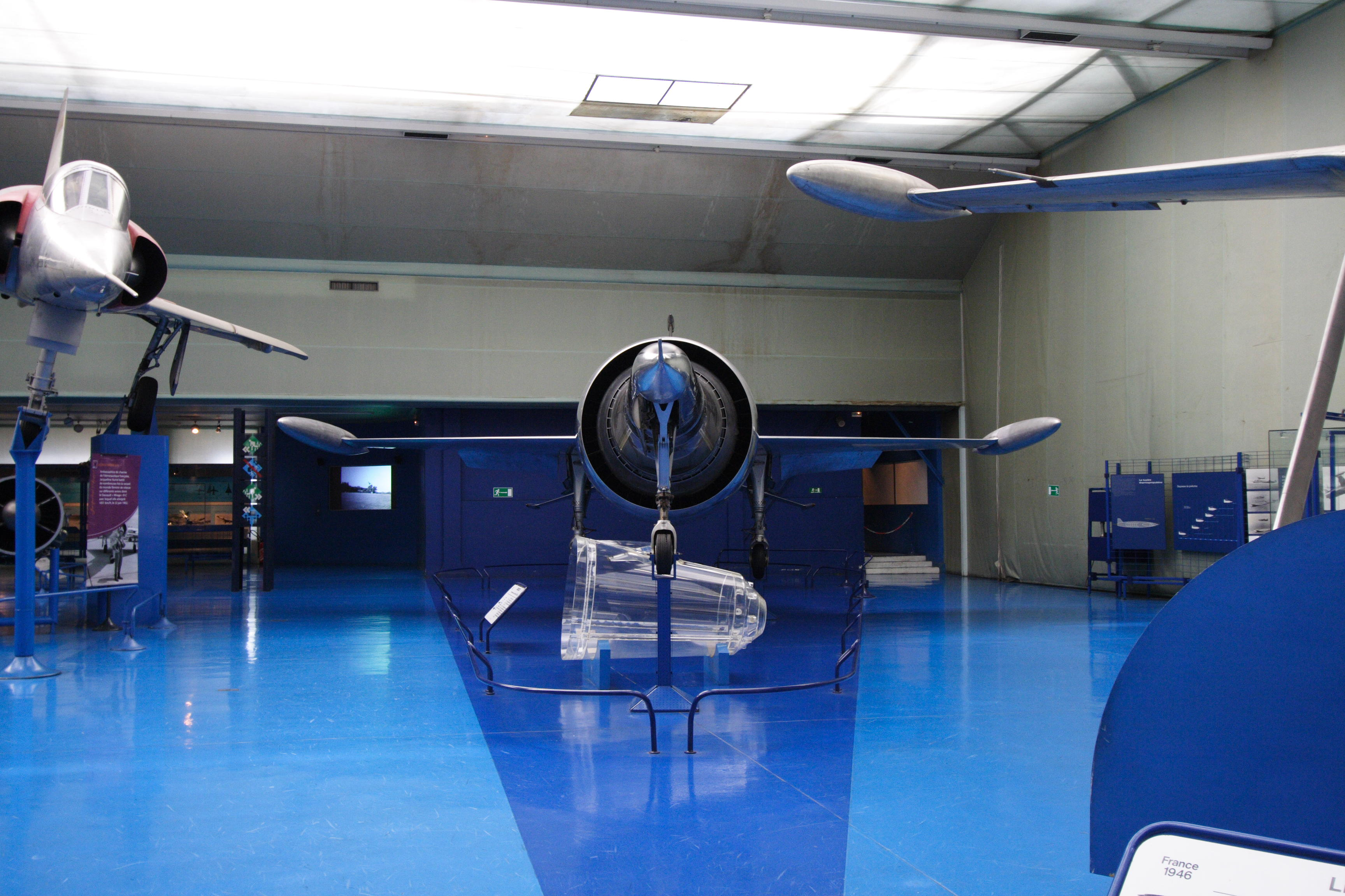 French experimental aircraft Leduc 022 (Musée de l'air et de l'espace, Le Bourget, France)